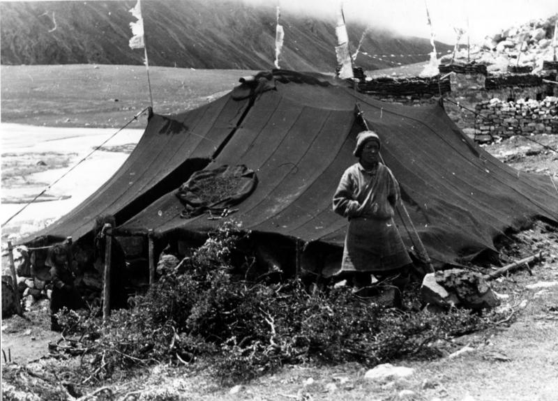 Gayokang, Nomadenzelt